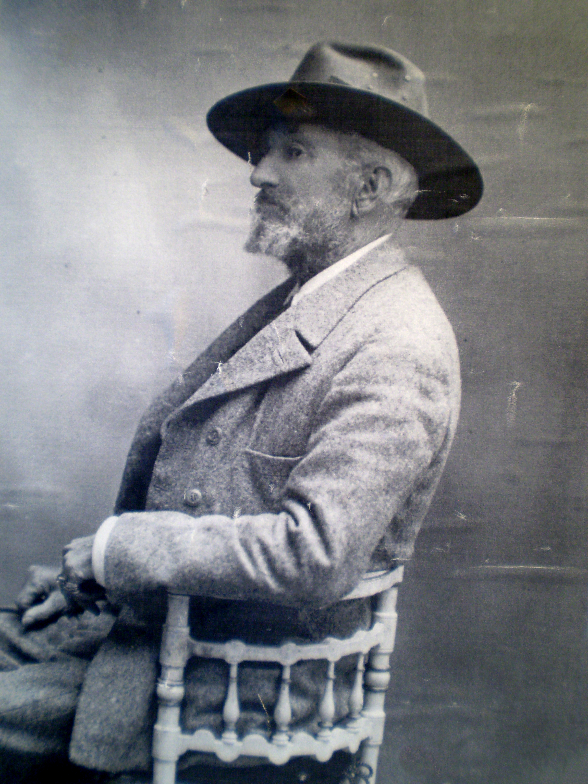 Fotografía de Antonio Covarsí Vicentell (1848-1937), padre del pintor Adelardo Covarsí. Imagen tomada en los años 1910.